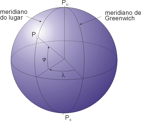 Coordenadas geográficas na esfera